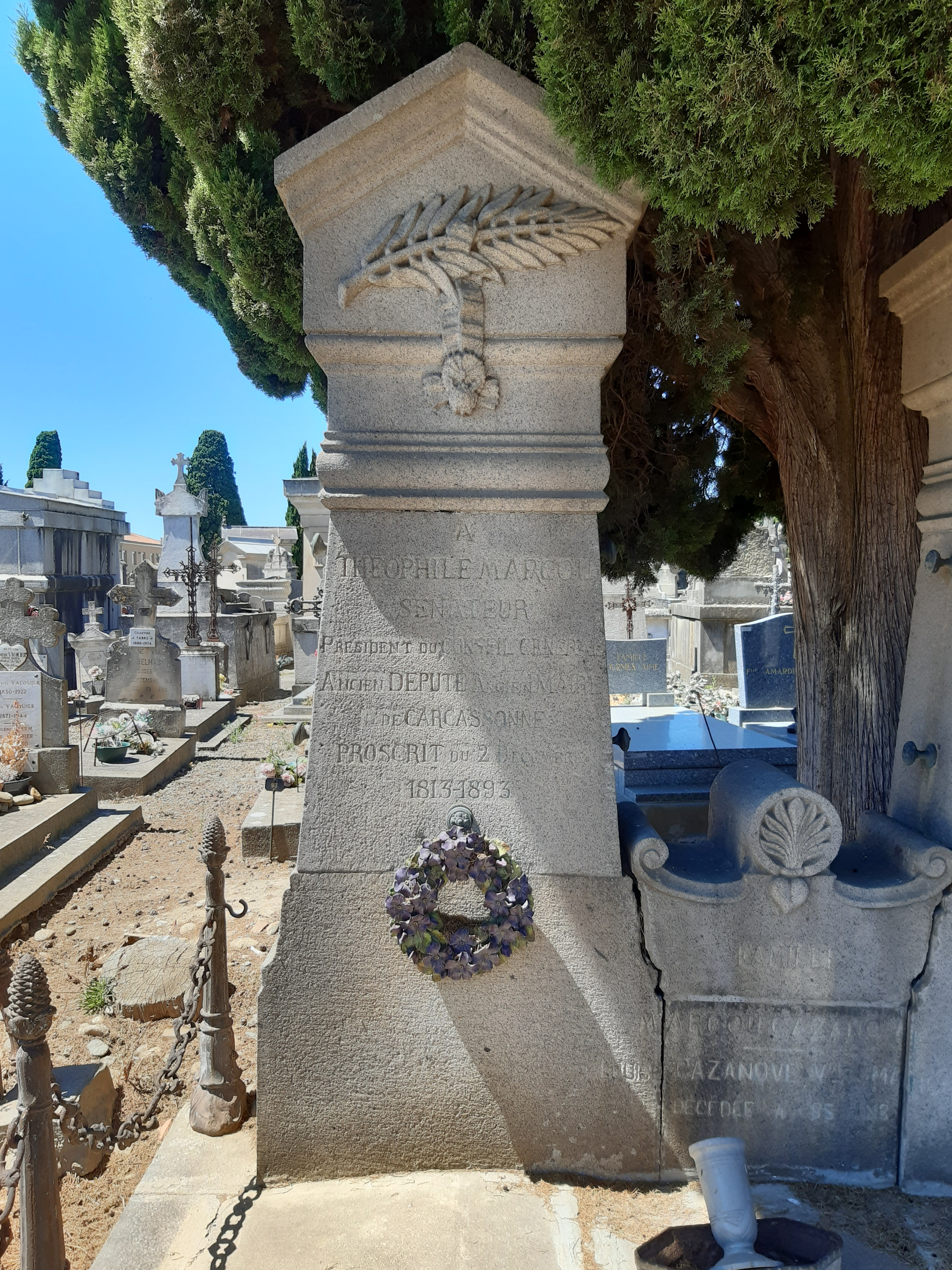 La tombe de l'ancien député, sénateur et maire de Carcassonne, Théophile Marcou, au cimetière Saint-Michel à Carcassonne.